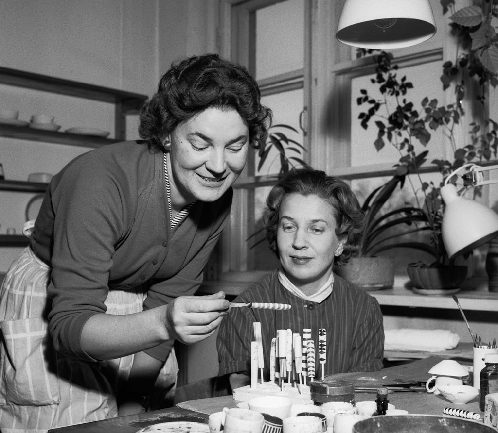 Arabian posliinitehtaan taiteilijat Raija Uosikkinen (1923–2004) ja Esteri Tomula (1920–1998) vuonna 1957.